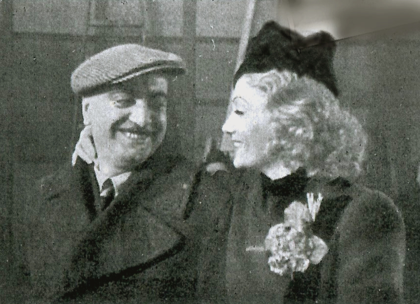 Il regista e produttore Alfredo Guarini e l'attrice Isa Miranda, sua moglie, in una foto del 1942